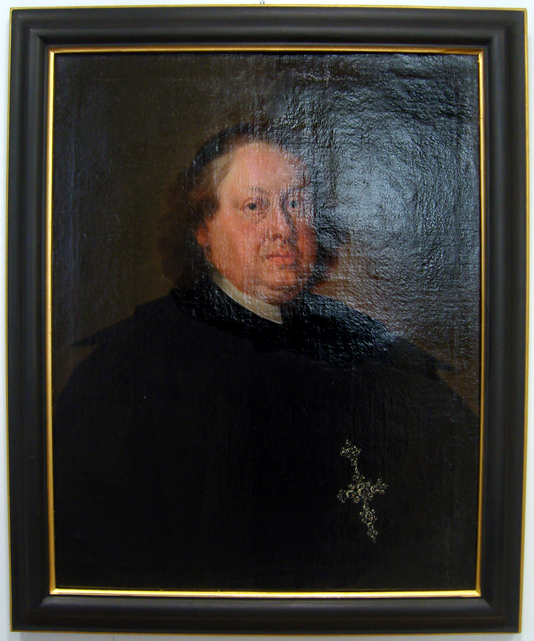 Porträt des Fuldaer Fürstbischof Amand von Buseck, gemalt von Emanuel Wohlhaupter; ausgestellt im Vonderau-Museum in Fulda; Öl auf Leinwand um 1740